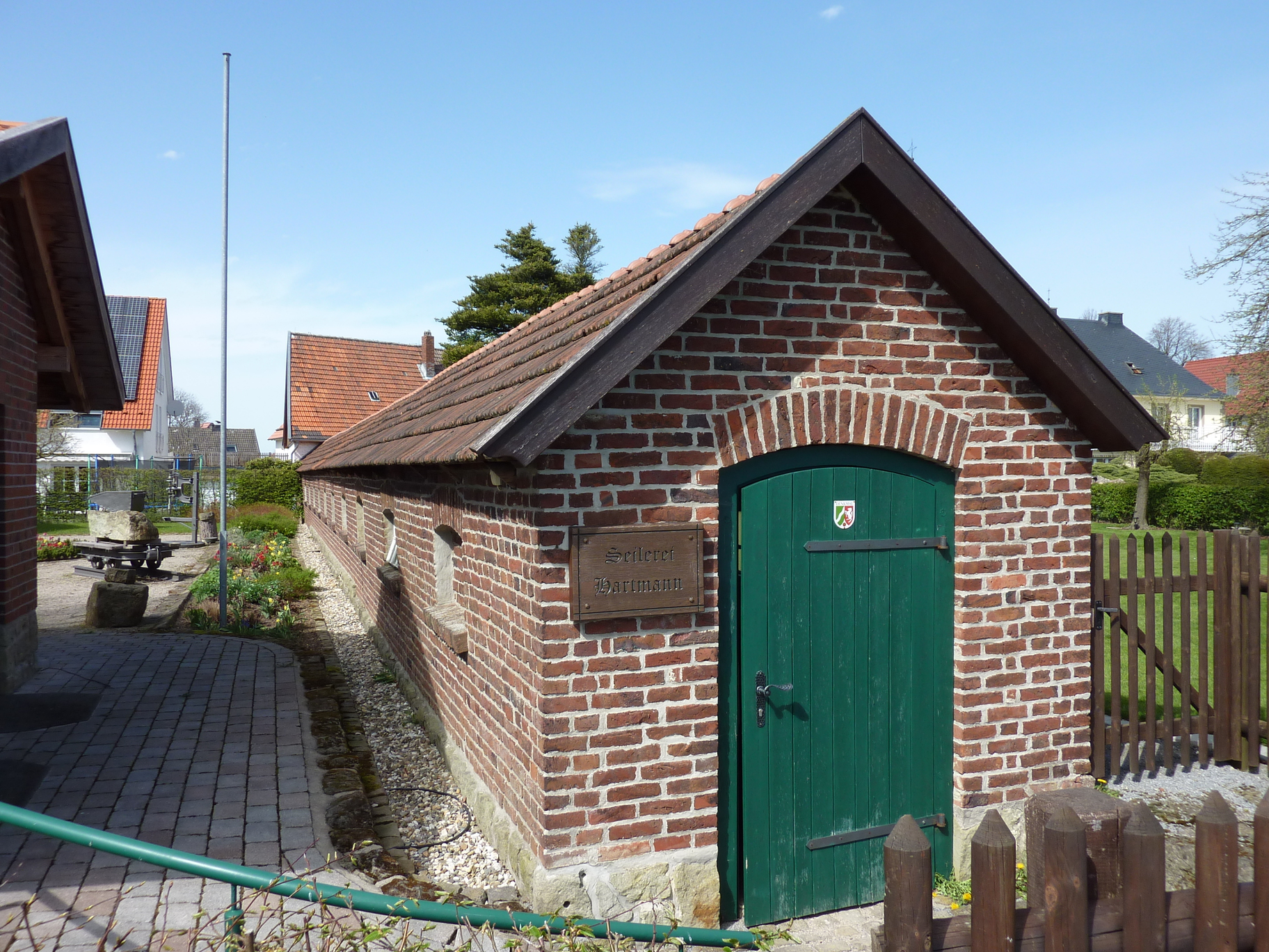 Seilerei, RüthenThis is a photograph of an architectural monument., no. 0